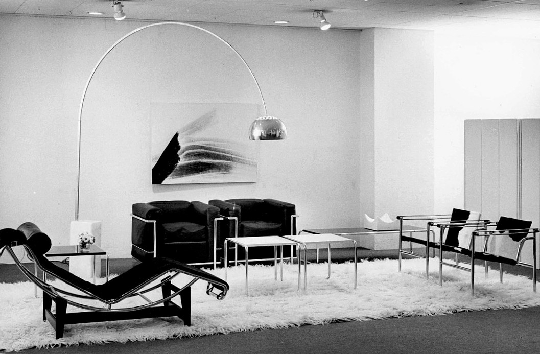 Nybrogatan 11: Nordiska Galleriet, interiör